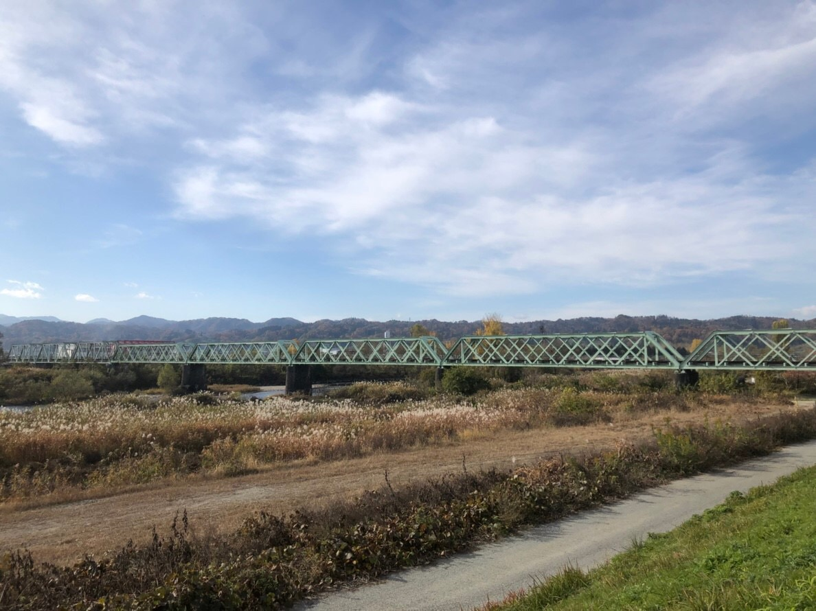 2018年11月18日撮影